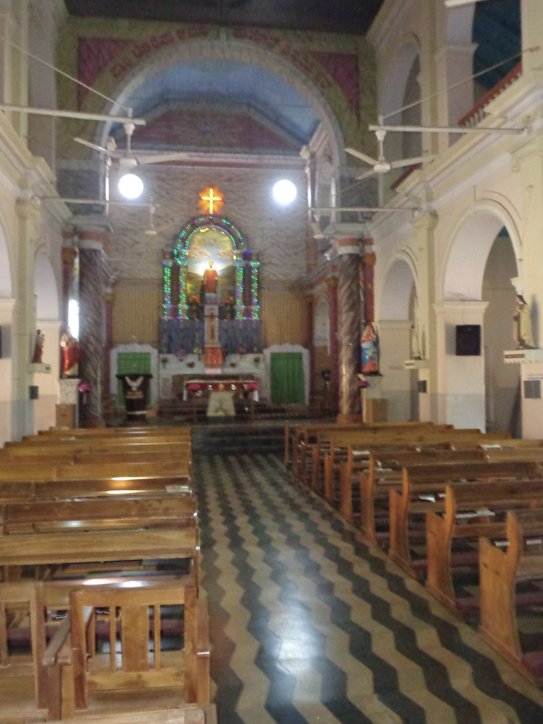 st Laurence chrurch, Attur north, Karkala, Karnataka, India